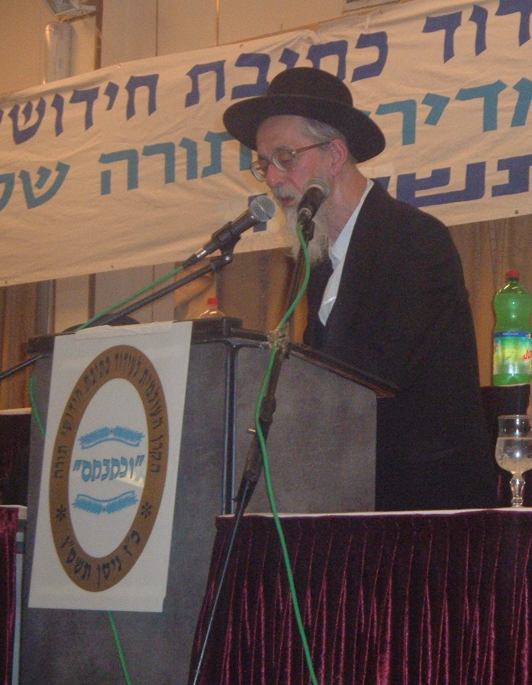 נואם בכנס עמלי בתורה שע"י ארגון וכתבתם